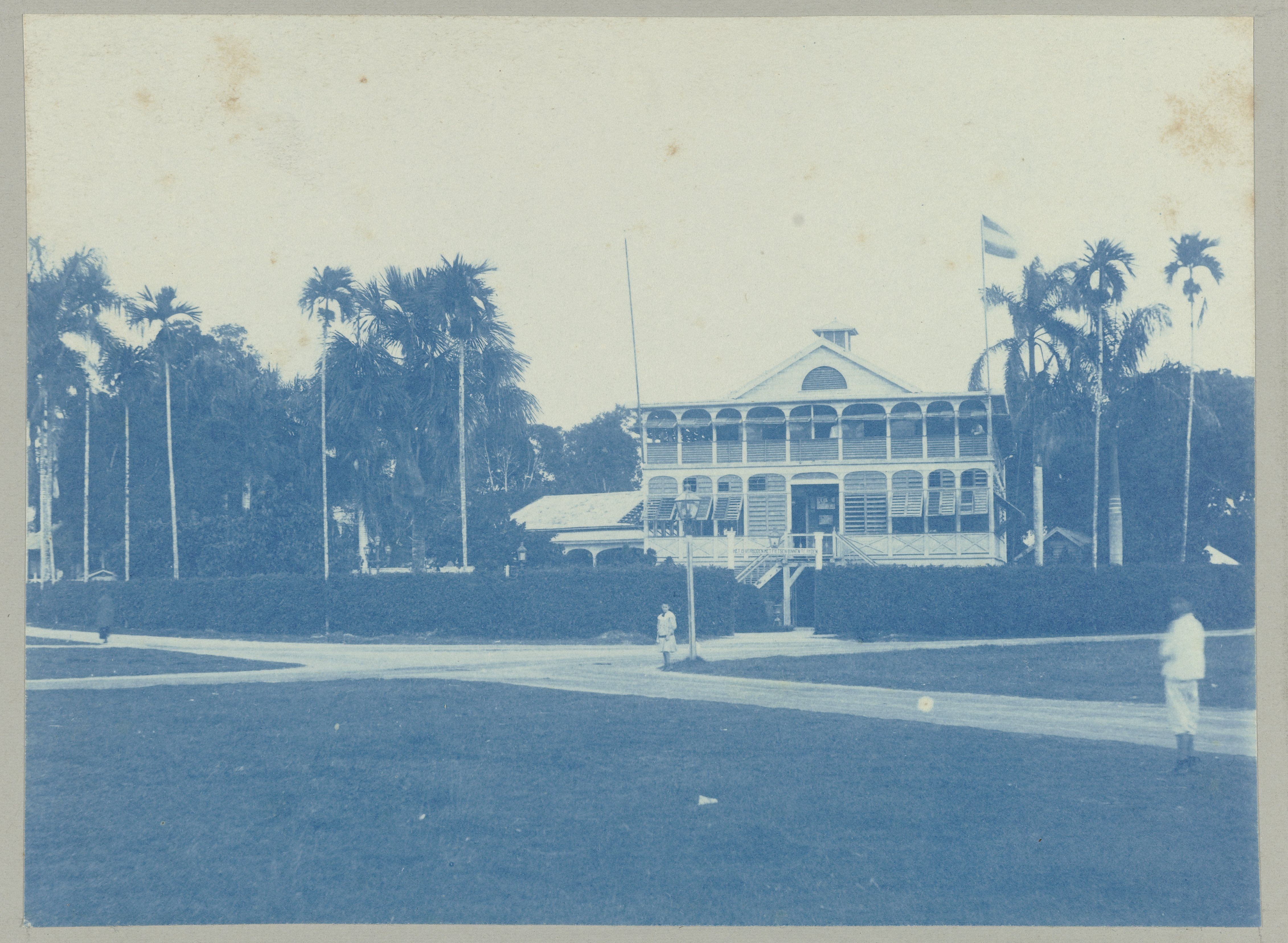 IdentificatieTitel(s): Park (titel op object)Objecttype: foto Objectnummer: NG-1994-65-2-17-1Omschrijving: Gezicht op sociëteit Het Park te Paramaribo. Onderdeel van het fotoalbum Souvenir de Voyage (deel 2), over het leven van de familie Doijer in en rond de plantage Ma Retraite in Suriname in de jaren 1906-1913.VervaardigingVervaardiger: fotograaf: Hendrik Doijer (toegeschreven aan)Plaats vervaardiging: SurinameDatering: 1906 - 1913Fysieke kenmerken: cyanotypieMateriaal: fotopapier Techniek: cyanotypieAfmetingen: foto: h 118 mm × b 161 mmOnderwerpWanneer: 1906 - 1913Waar: SurinameParamariboHet ParkWie: familie DoijerVerwerving en rechtenVerwerving: aankoop 1994Copyright: Publiek domein